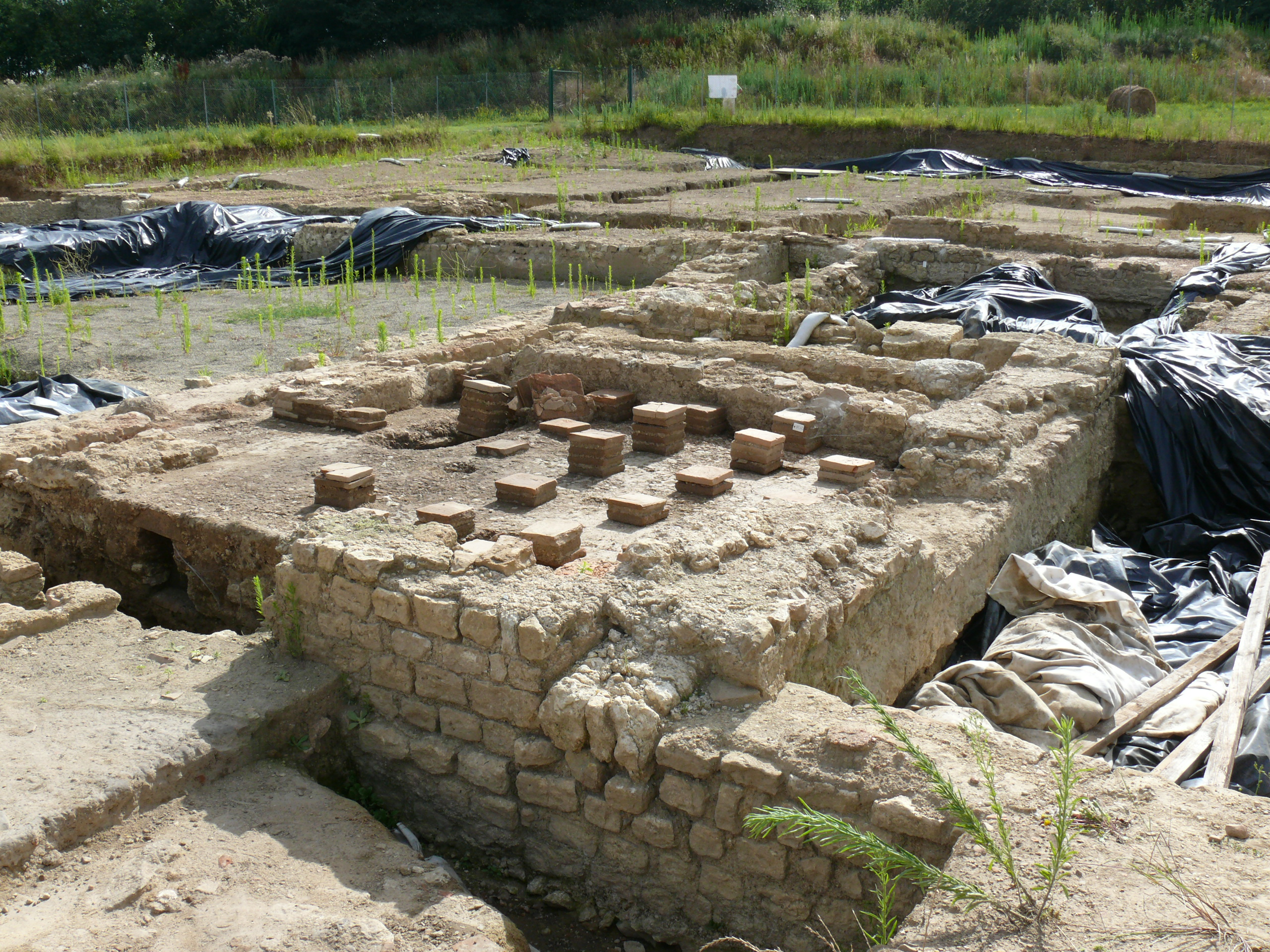 Cité gallo-romaine de Tasta/Elusa ; vue d'une maison à hypocauste en cours de fouilles.